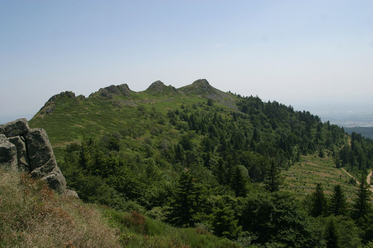 Vue des Trois-Dents depuis le Col de l'Oeillon